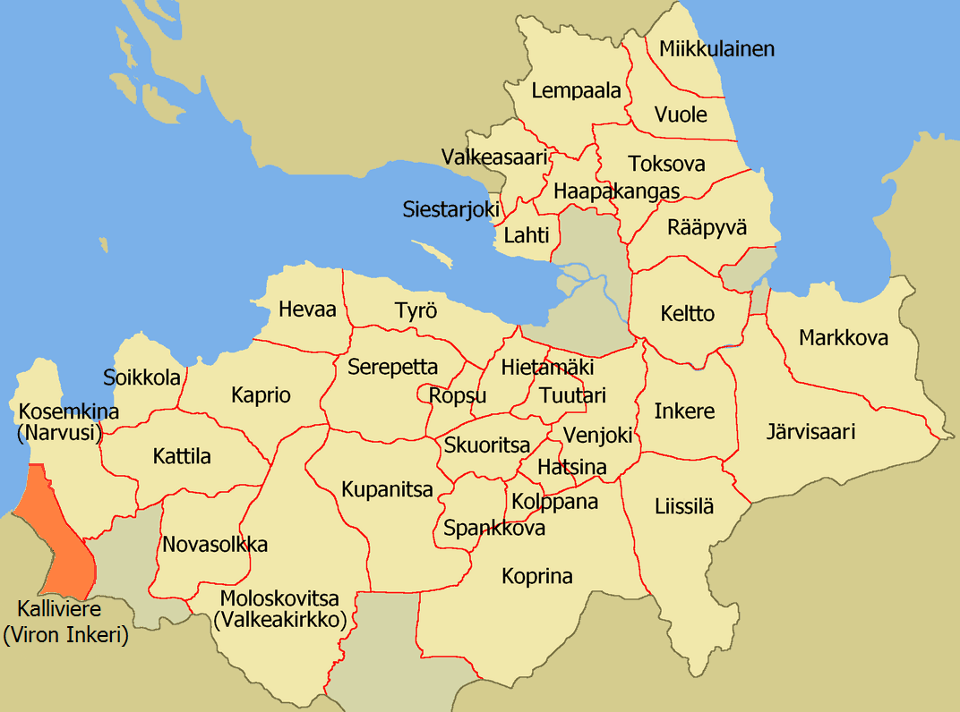 Эстонская Ингерманландия на карте приходов ЕЛЦИ (1920—1940)